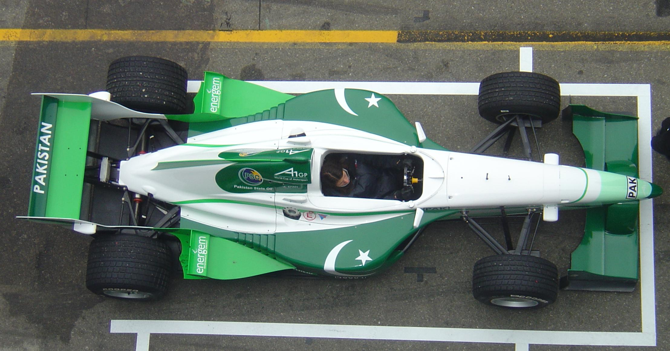 A1 Team Pakistan, entstanden im Rahmen des A1GP-Rennwochenendes auf dem Automotodrom Brno